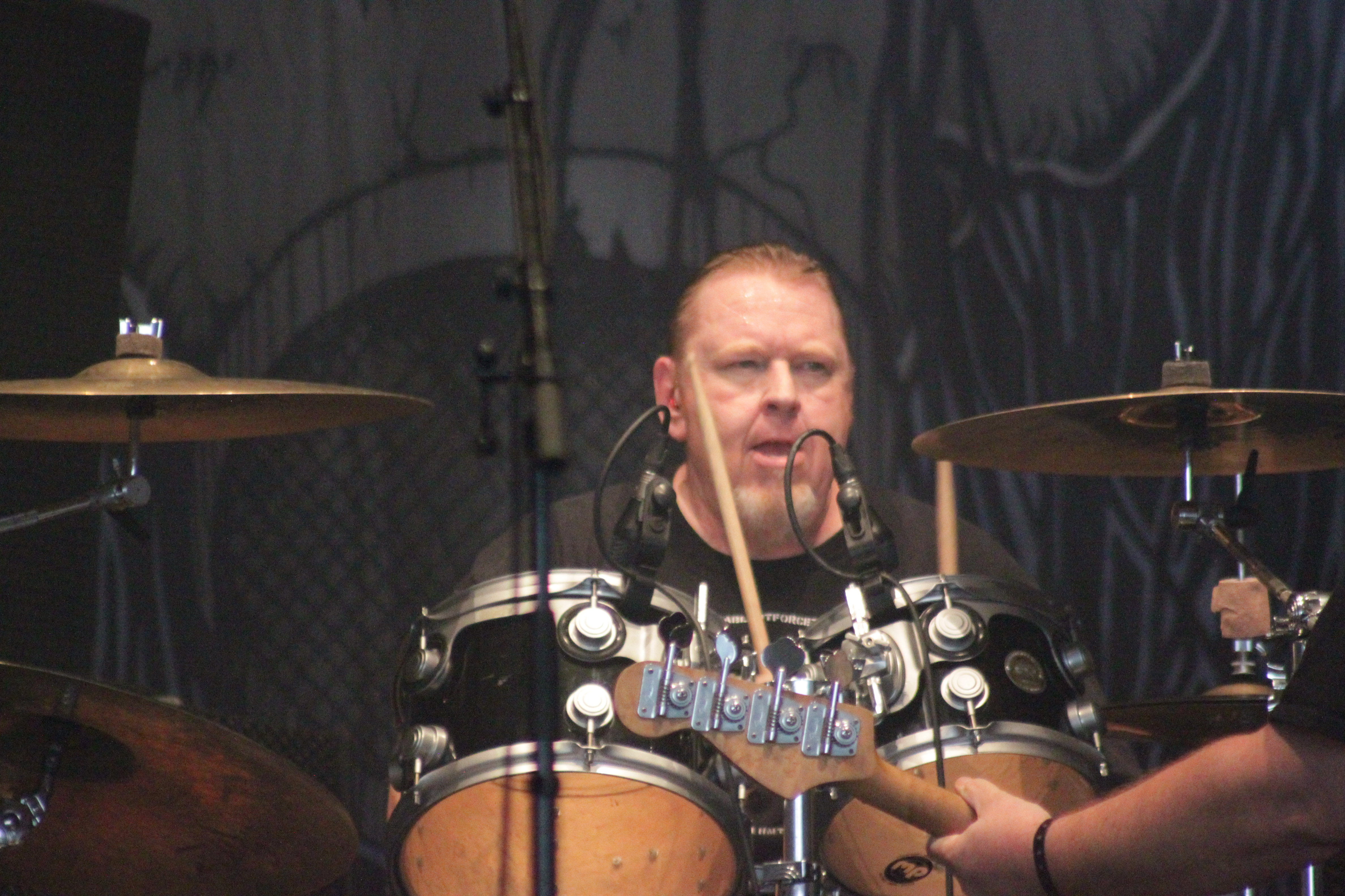 Greg Hall, Sacred Reich, Hellfest 2016.